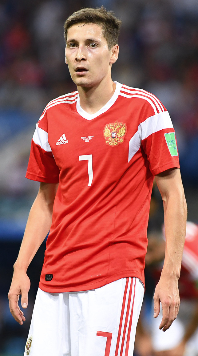 Сборная России заканчивает ЧМ-2018 с поднятой головой. Хорватия выходит в полуфинал